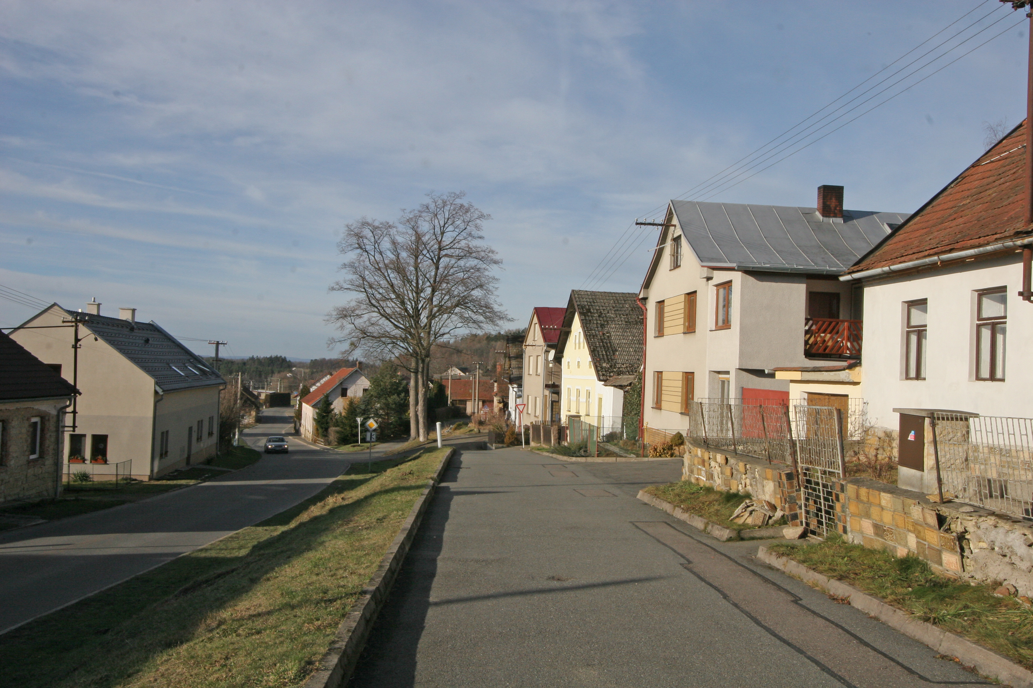 Perálec čp. 70, 19, 67